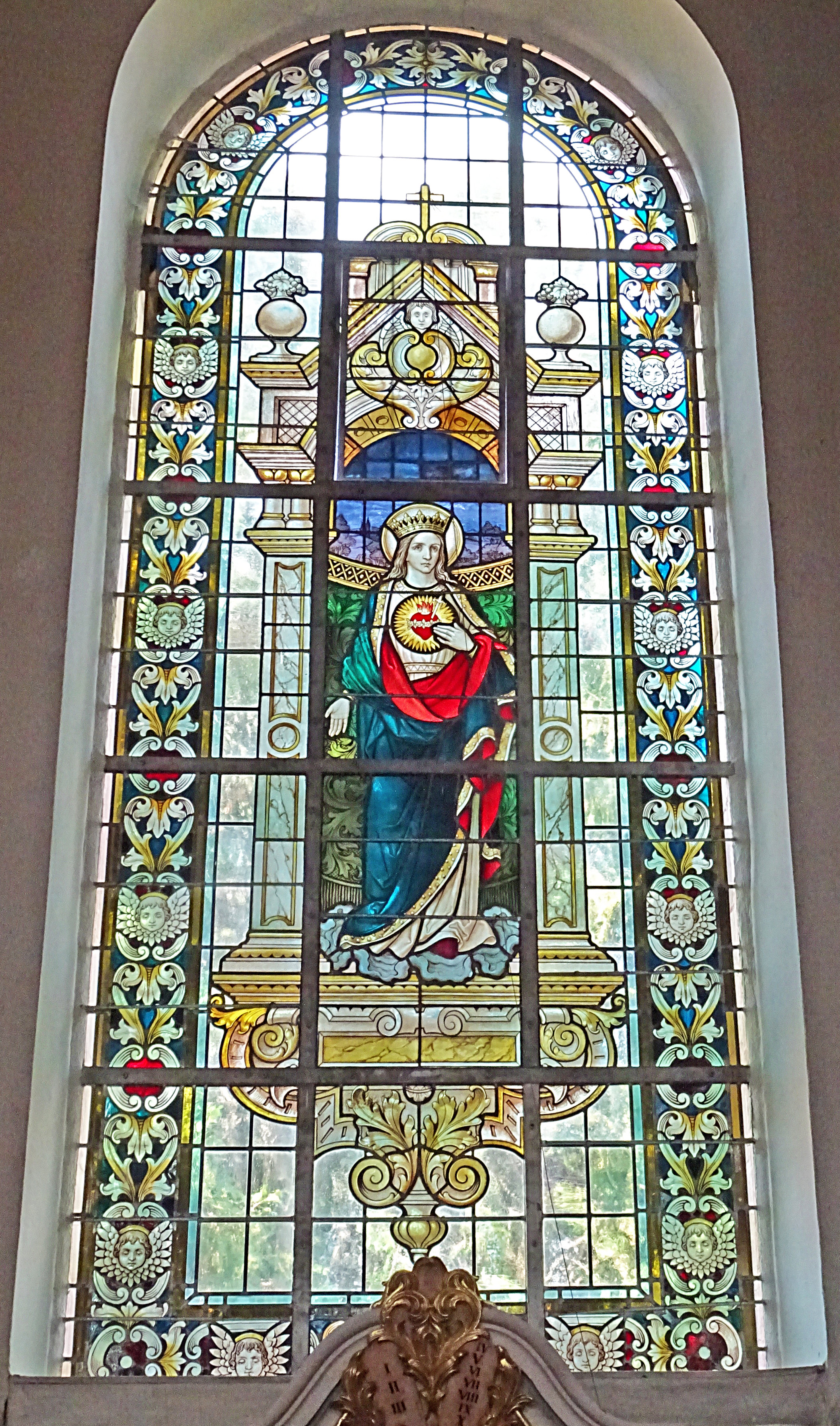 Buntglasfenster in der Dorfkirche St. Bartholomäus (Hohengandern)